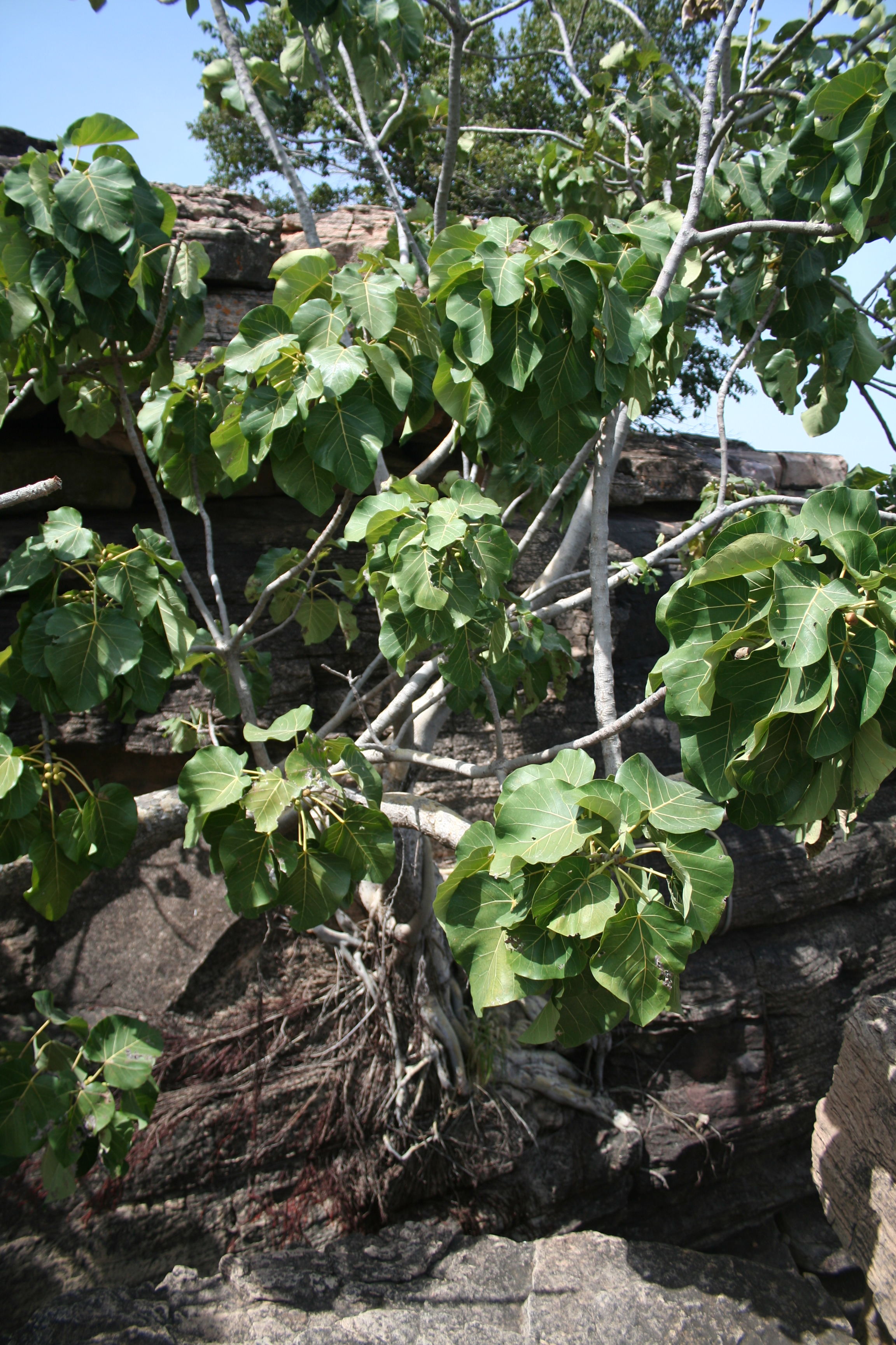 Ficus abutilifolia, Chaine de Gobnangou near Tambaga, Burkina Faso